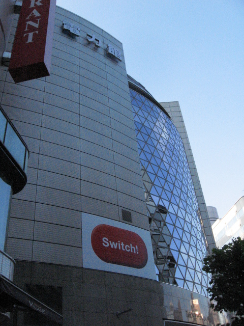 東京・渋谷にある電力館